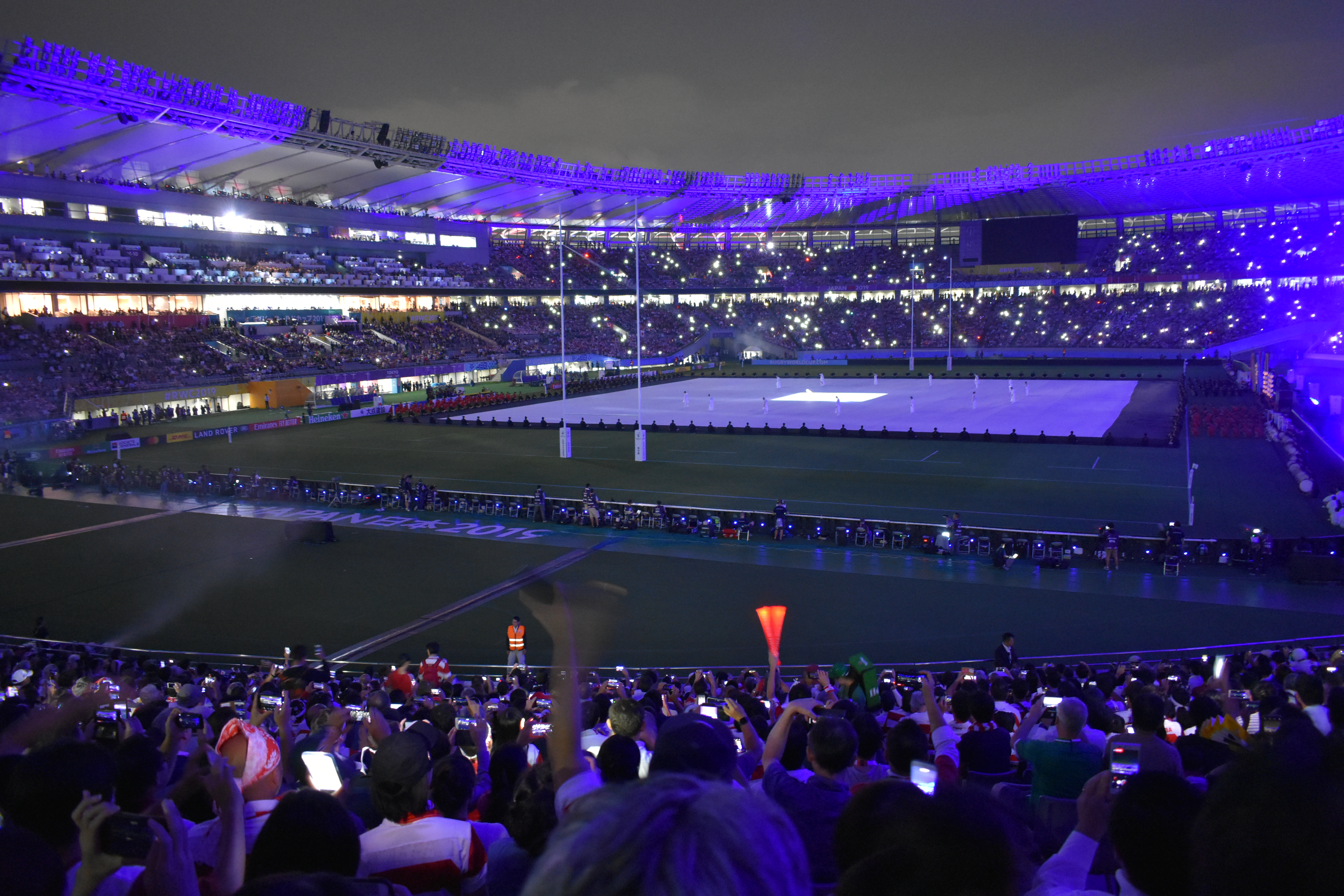 ラグビーワールカップ2019